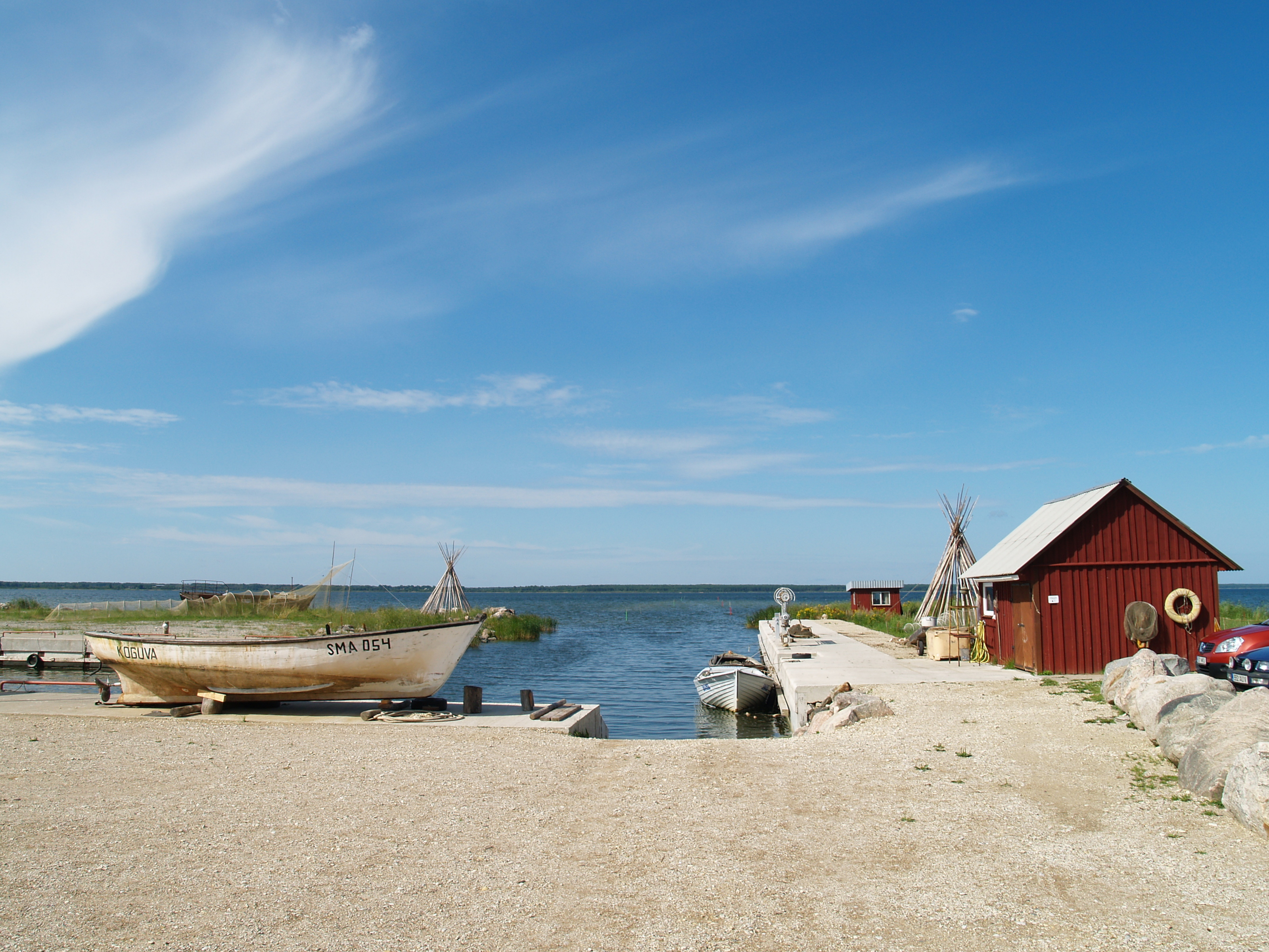 Koguva sadam